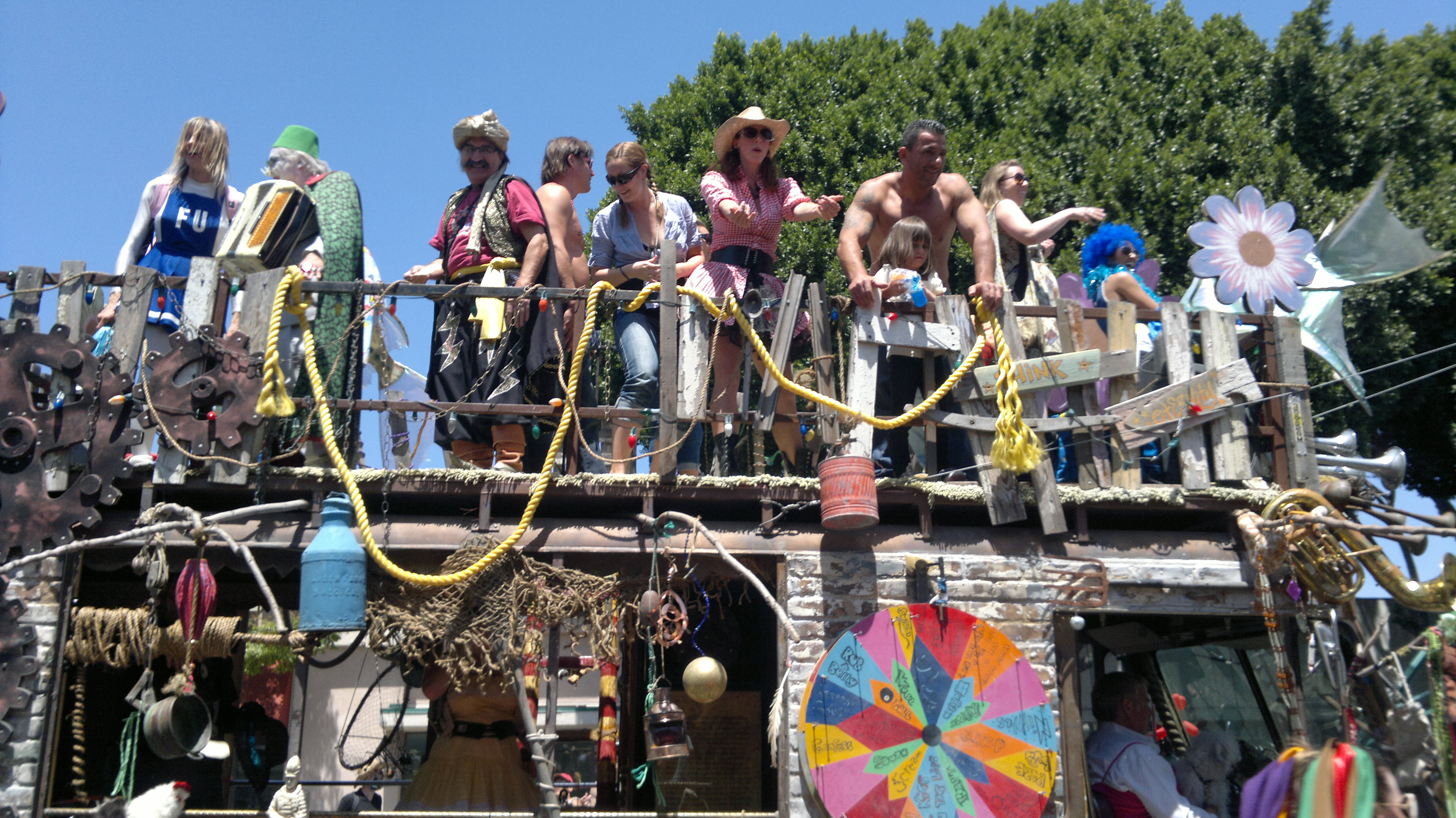 2011 Doo Dah Hippie bus, Pasadena CA